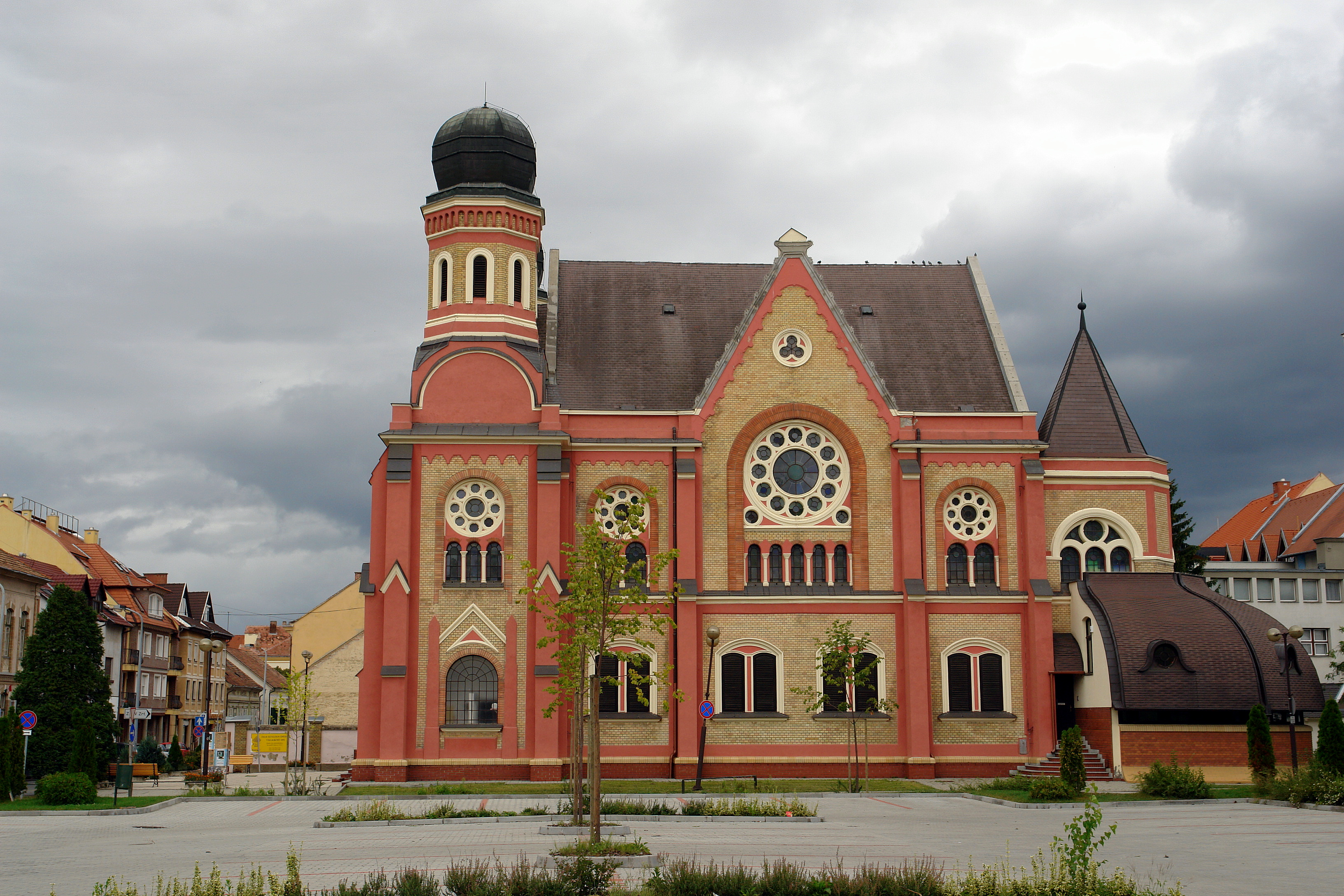 A zalaegerszegi zsinagóga